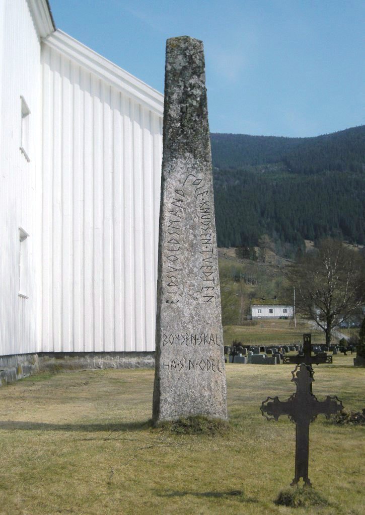 Minnestein over eidsvollsmannen Ole Knudsen Tvedten utenfor Valle kirke i Setesdalen